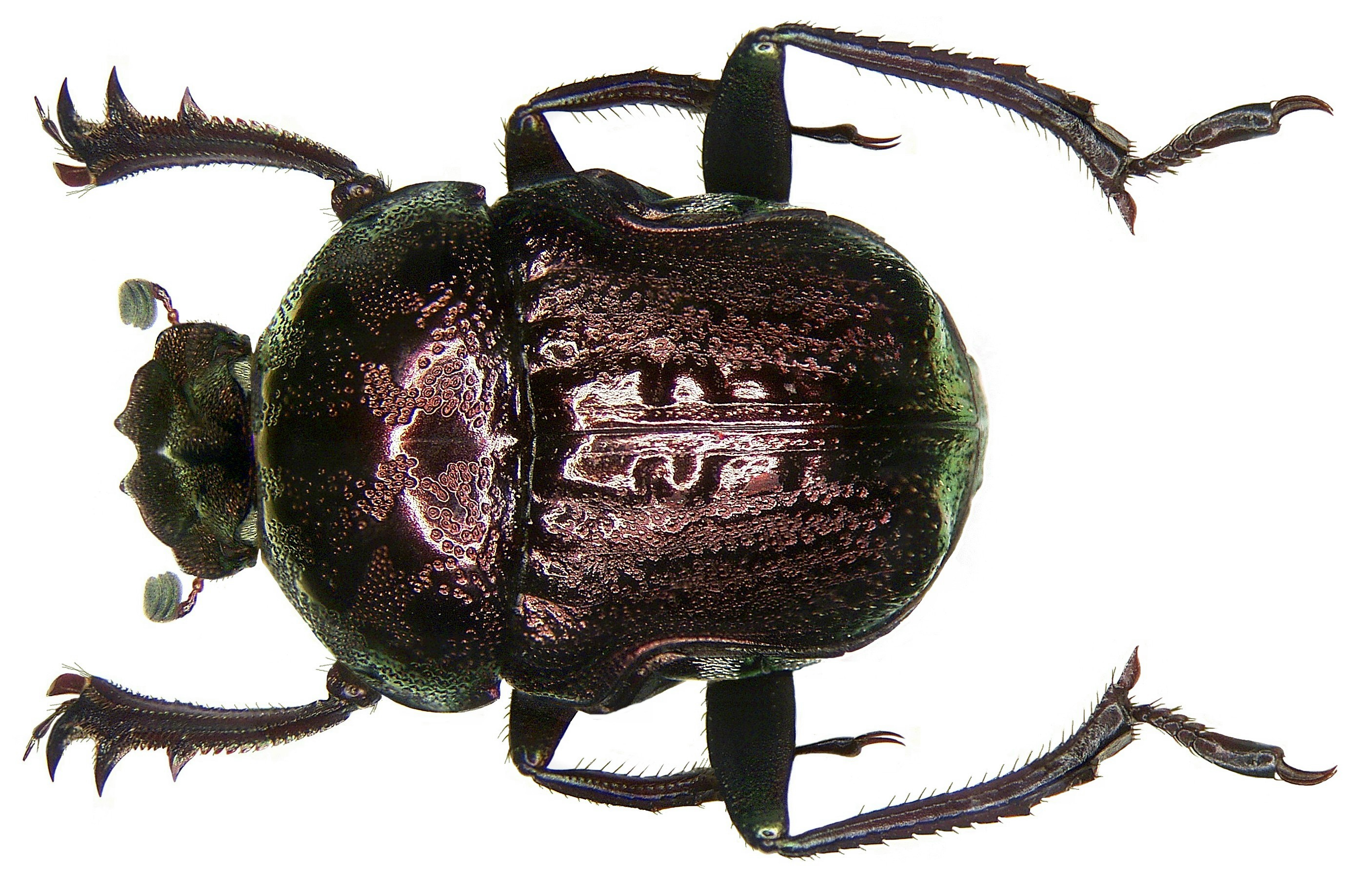 Familie: Scarabaeidae Größe: 8-13 mm Verbreitung: Afrika südlich der Sahara Fundort: Senegal, M`Bour leg.det. U.Schmidt, 1992 Foto: U.Schmidt, 2008